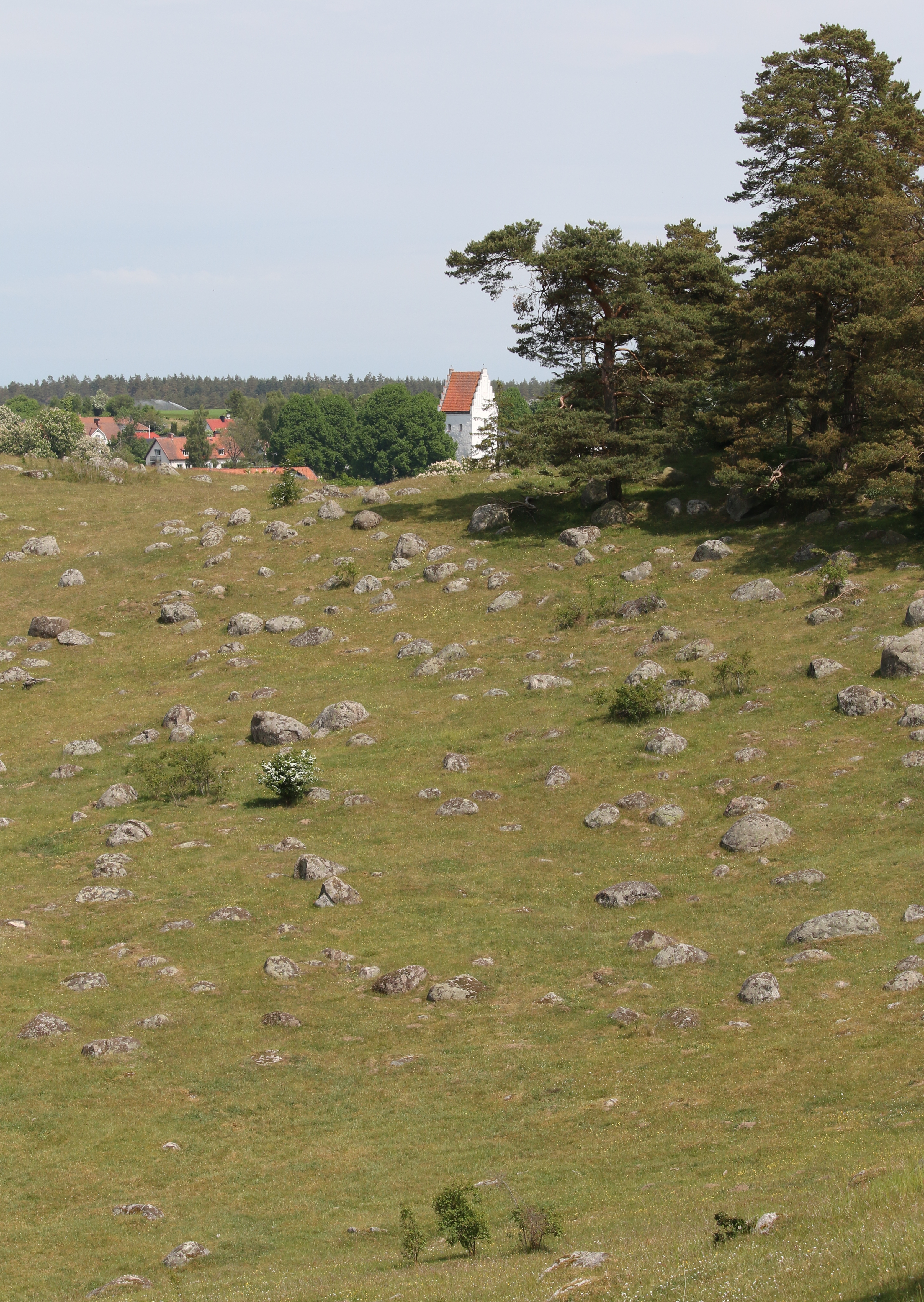 Degeberga backar